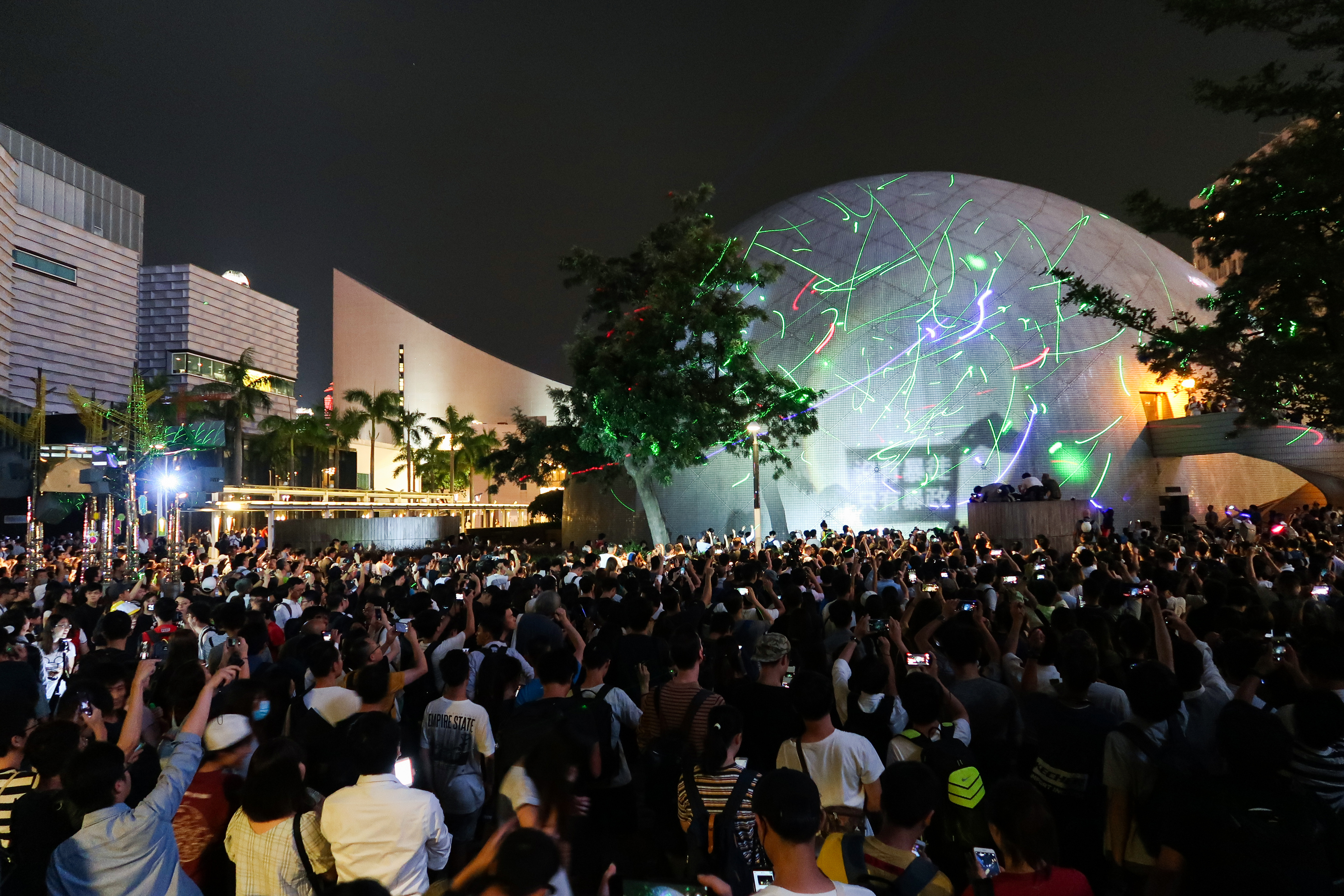 HK laser pen protest